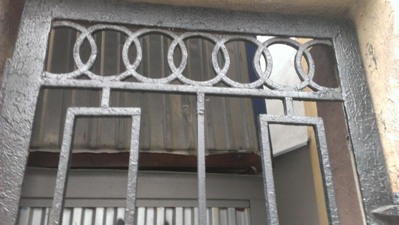 Исторический орнамент на калитке сделанной в 1936 г